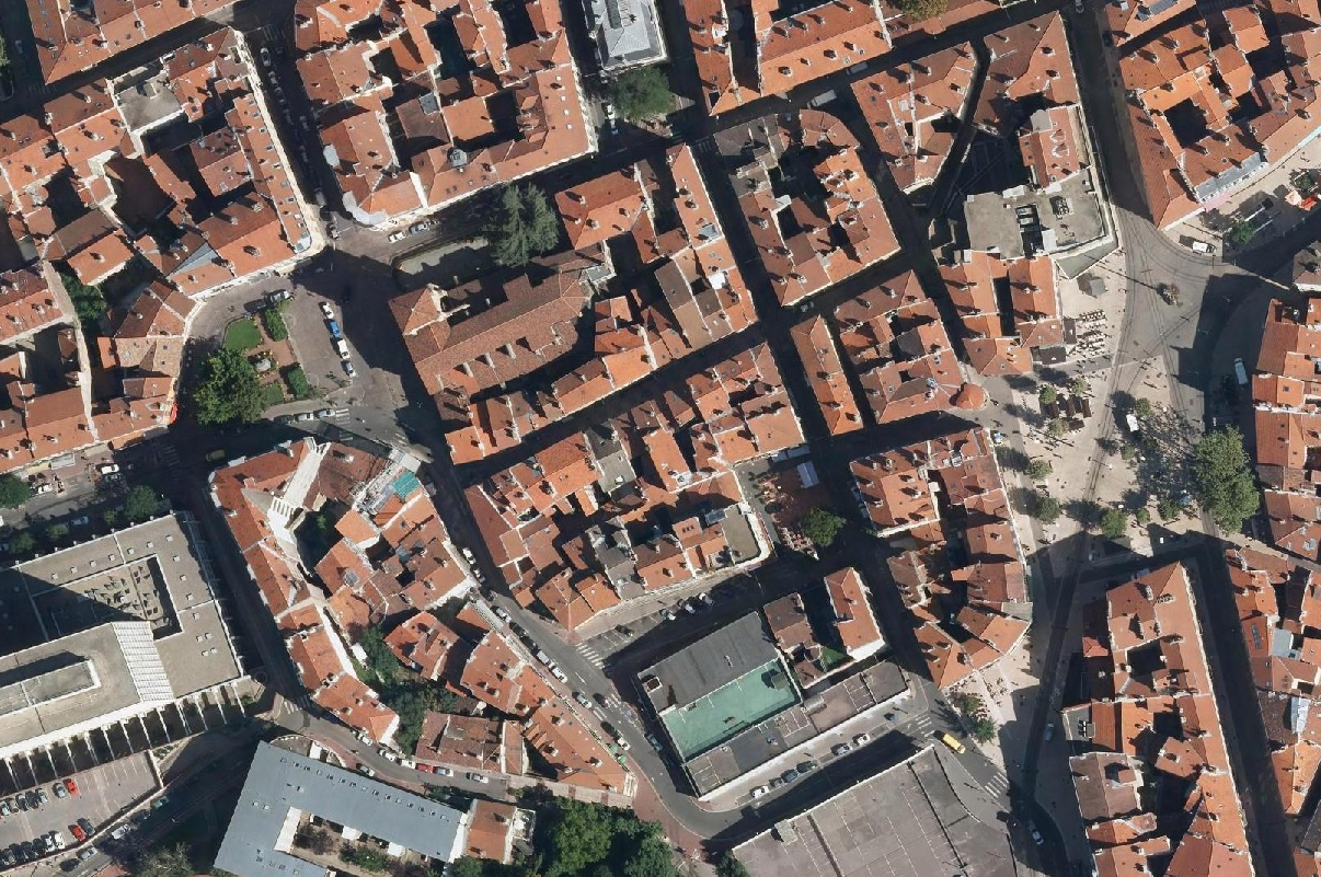 Périmètre des anciennes fortifications de la ville de Saint-Etienne (2014).